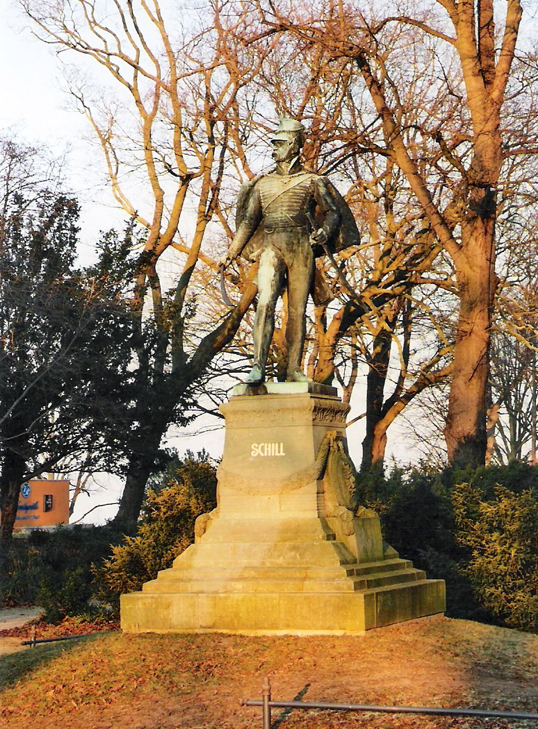 Stralsund, Denkmal für Ferdinand von Schill (2006-01-10); Autor: Benutzer:Klugschnacker